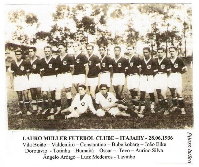 Time do Lauro Muller Futebol Clube